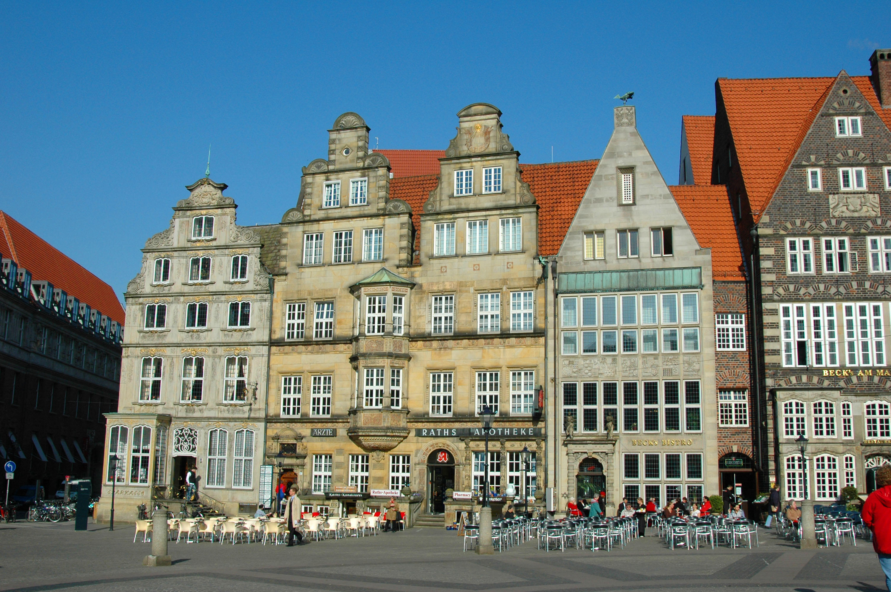 Häuser am Markt in Bremen